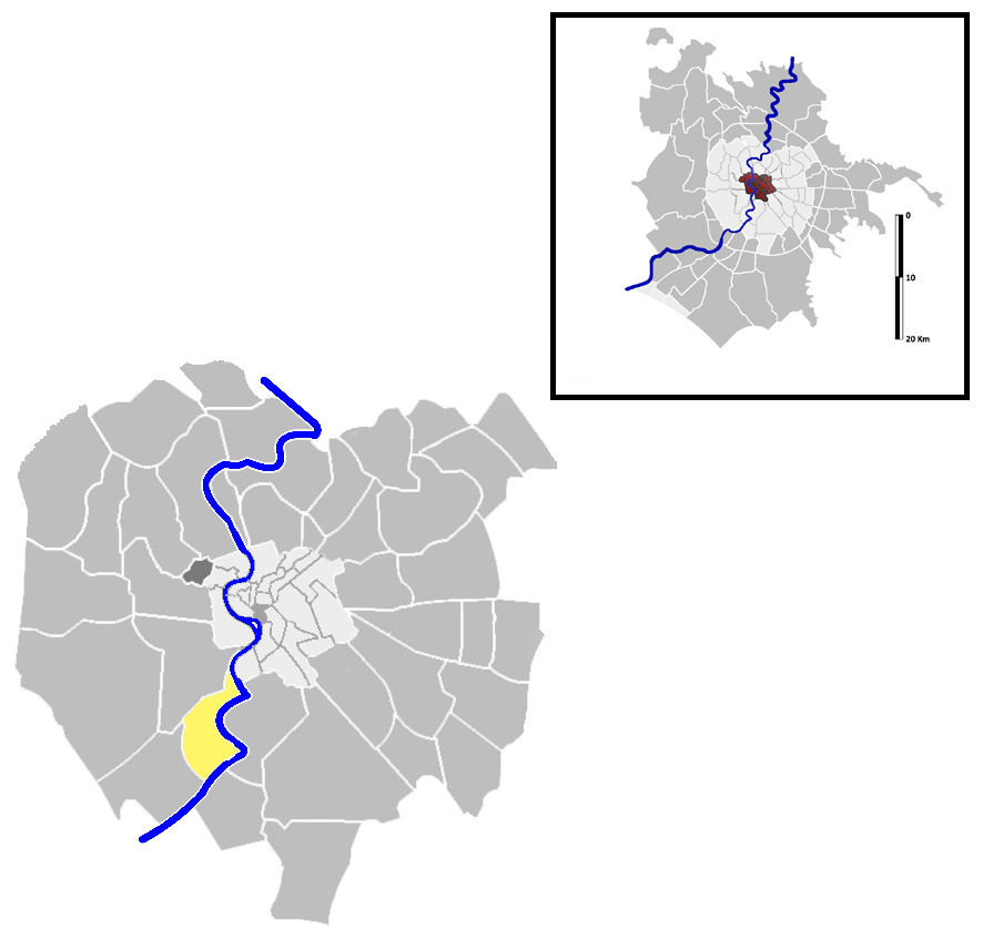 Portuense